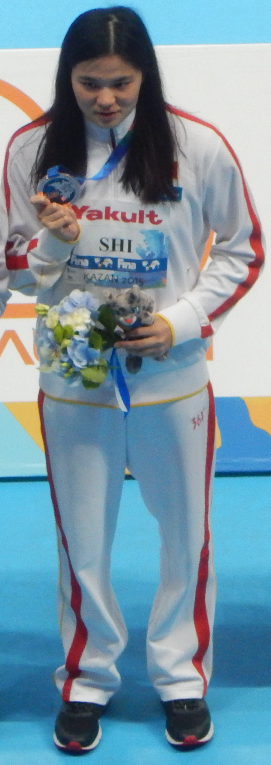 Медалисты чемпионата мира в Казани на дистанции 200 метров брассом у женщин